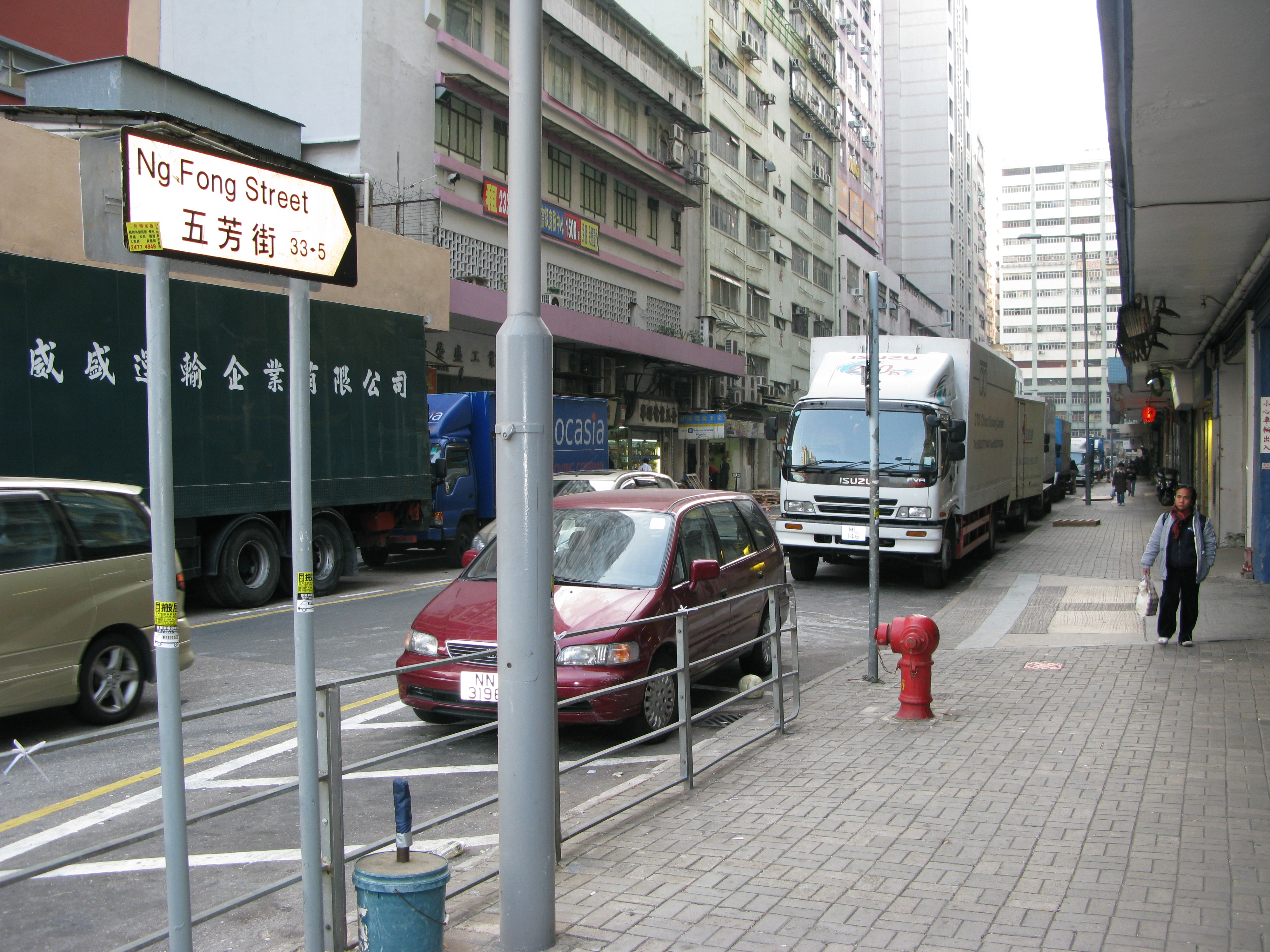 中文（香港）: 香港九龍新蒲崗五芳街